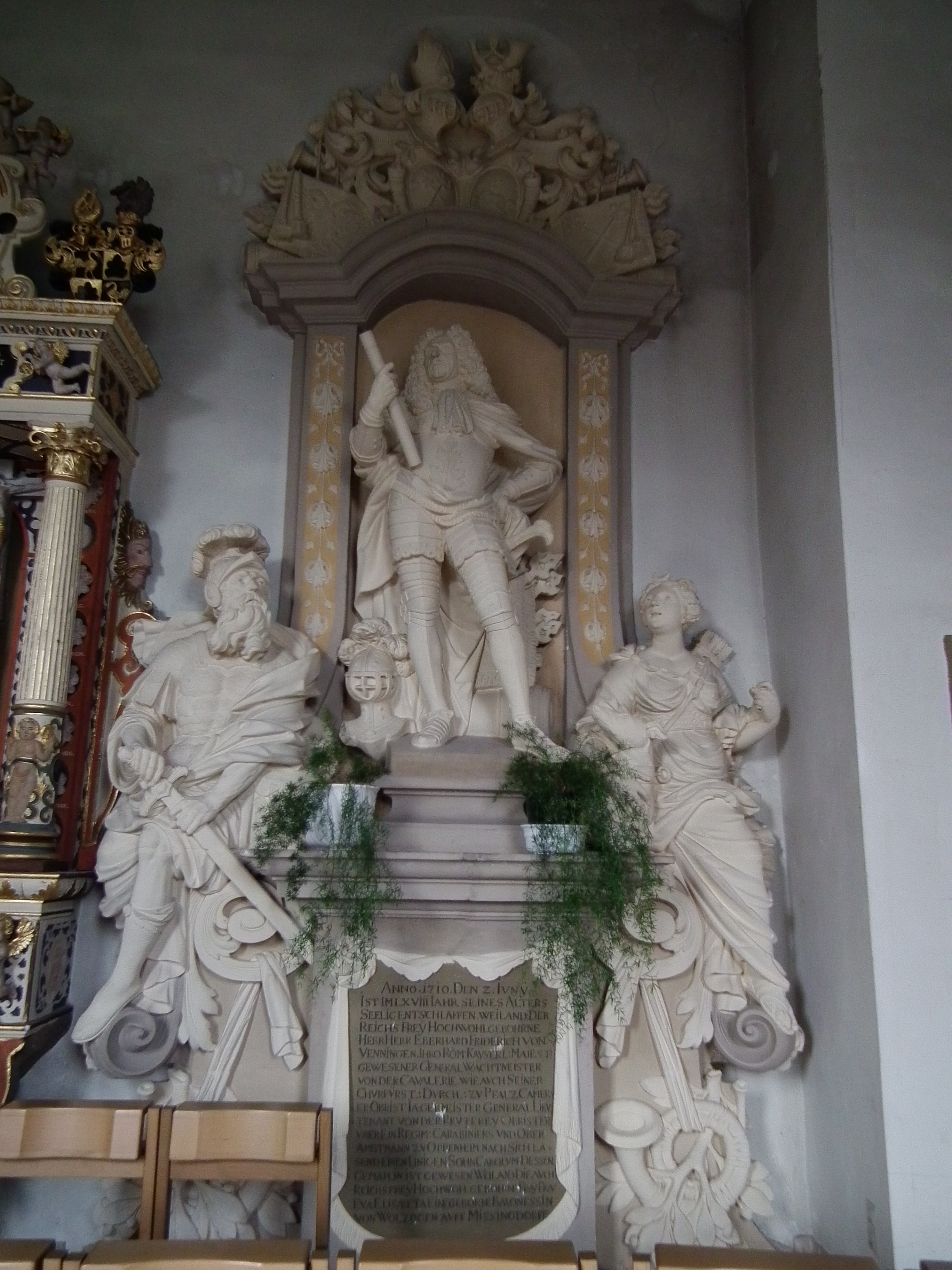 Epitaph Eberhard Friedrich von Vennningen in der evangelischen Kirche in Neidenstein (Baden-Württemberg, Deutschland)